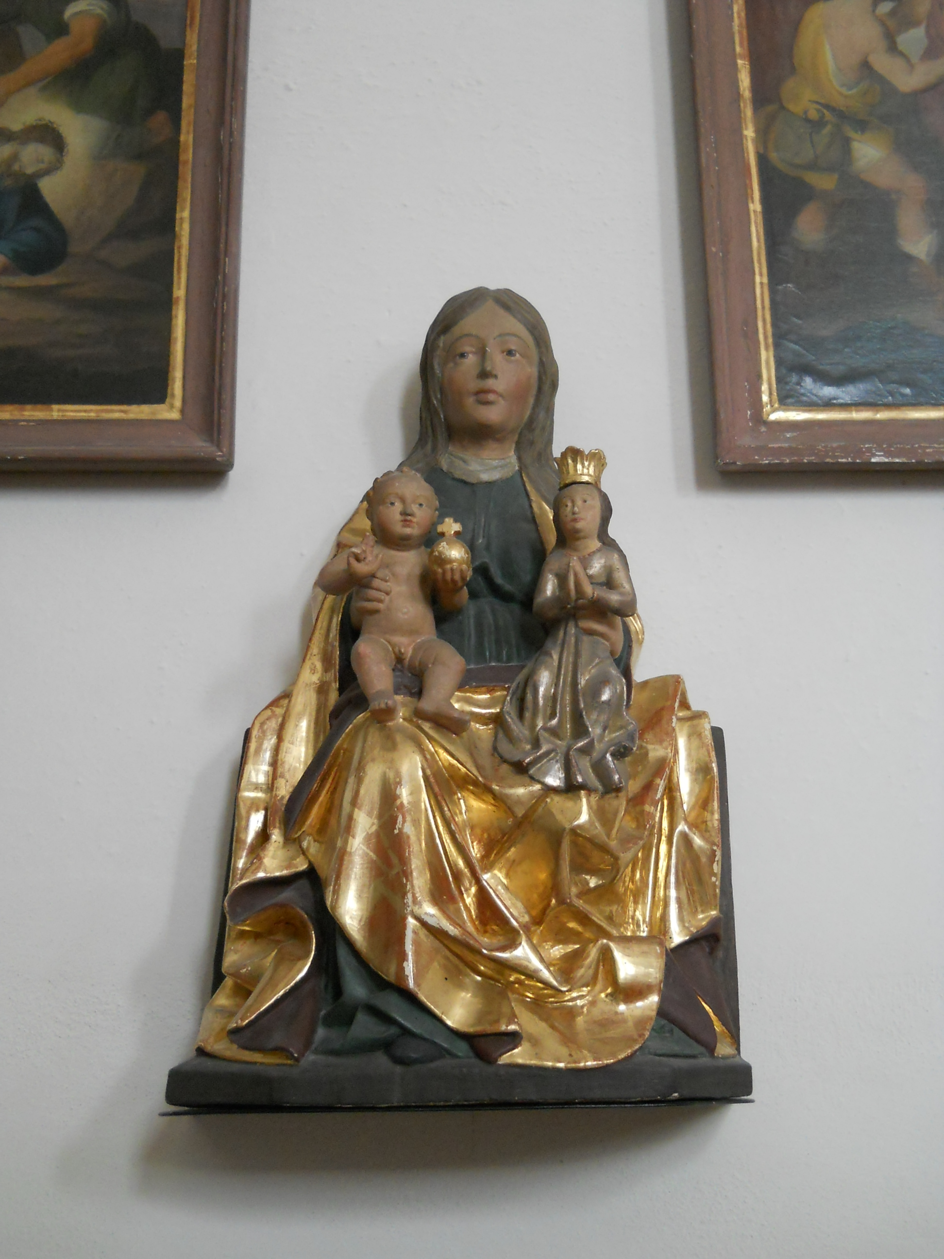 Rauenzell, Ortsteil von Herrieden im Landkreis Ansbach (Bayern), Kath. Pfarrkirche Mariä Heimsuchung, mittelalterliche Anna Selbdritt-Figur